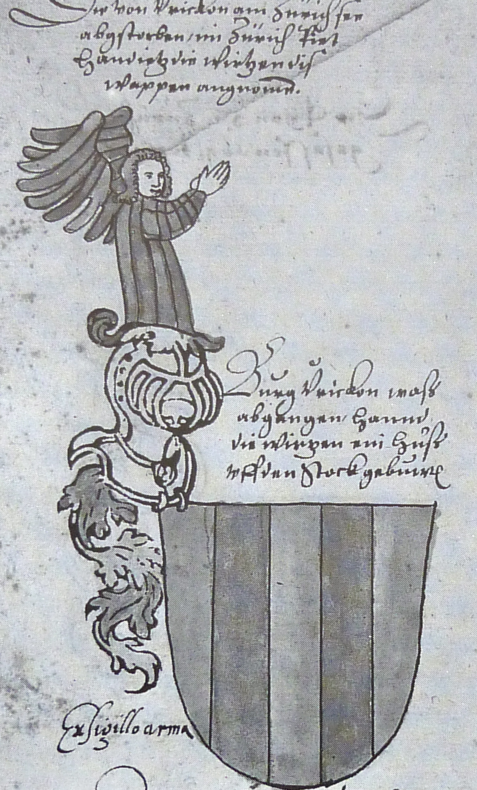 Wappen der Riter von Uerikon in Tschudis Wappenbuch; in der Mitte einziger Quellenbeleg für eine Burg Uerikon; (Stiftsbibliothek St. Gallen)